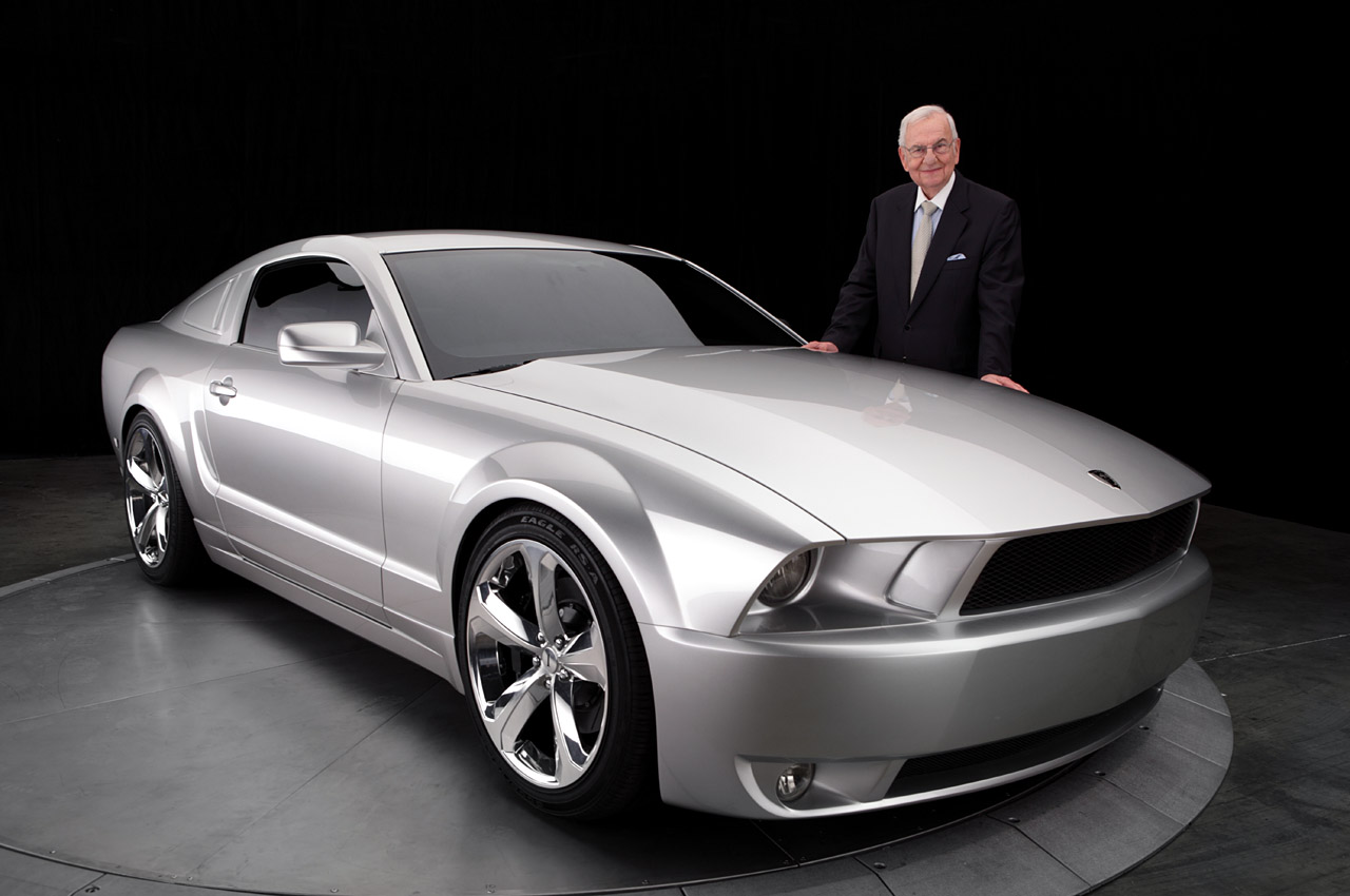 Lee Iacocca 2009 Mustang serial #001